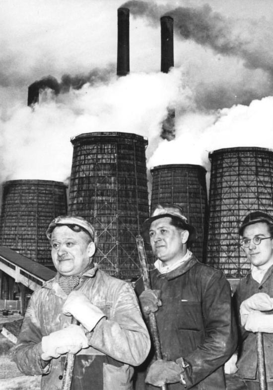 Bitterfeld, Kraftwerk, Industriearbeiter Zentralbild Schmiljun 1 Mot. 8.4.1954 Kraftwerker erreichten höchste Tagesleistung seit Bestehen des Betriebes Die Belegschaft des Kraftwerkes des Elektrochemischen Kombinates Bitterfeld erreichte im März 1954 einen seit dem beinahe 40-jährigen Bestehen des Werkes bisher einmaligen Produktionsrekord. In vorbildlicher Zusammenarbeit des gesamten Kollektivs überboten die Kraftwerker in einer Hochleistungsschicht die bisher höchste Tagesleistung der Nachkriegsjahre noch um 300.000 Kilowattstunden. UBz: Im Hintergrund die mächtigen Kühltürme und Schornsteine des Kraftwerkes. Im Vordergrund die Männer des Kraftwerkes, die an der Leistung beteiligt waren. (Montage)